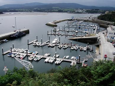 Vista do porto Deportivo de ribadeo dende o Mirador da ermida de S. Miguel uploader